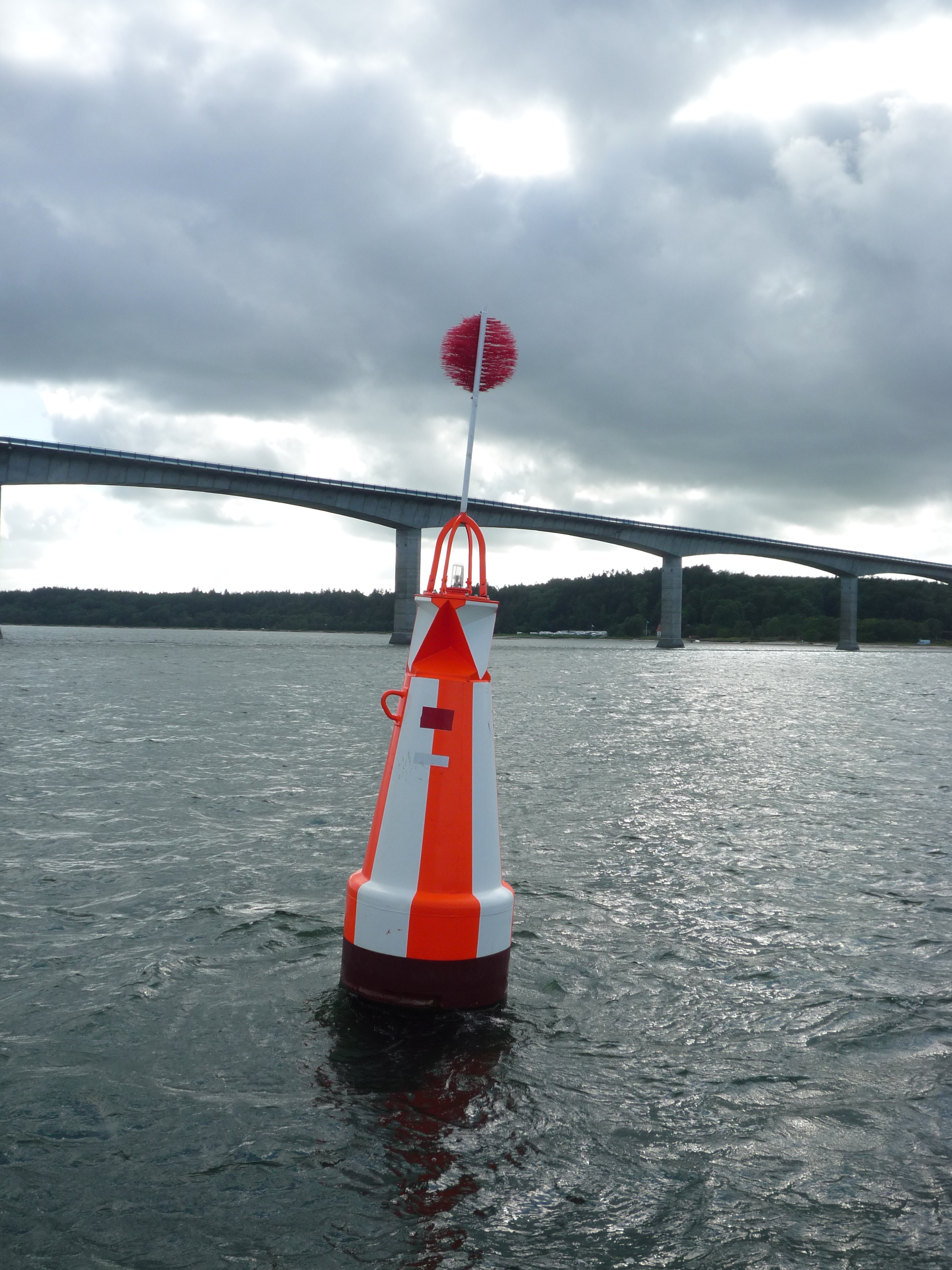 A safe water mark buoy in Limfjord, Denmark